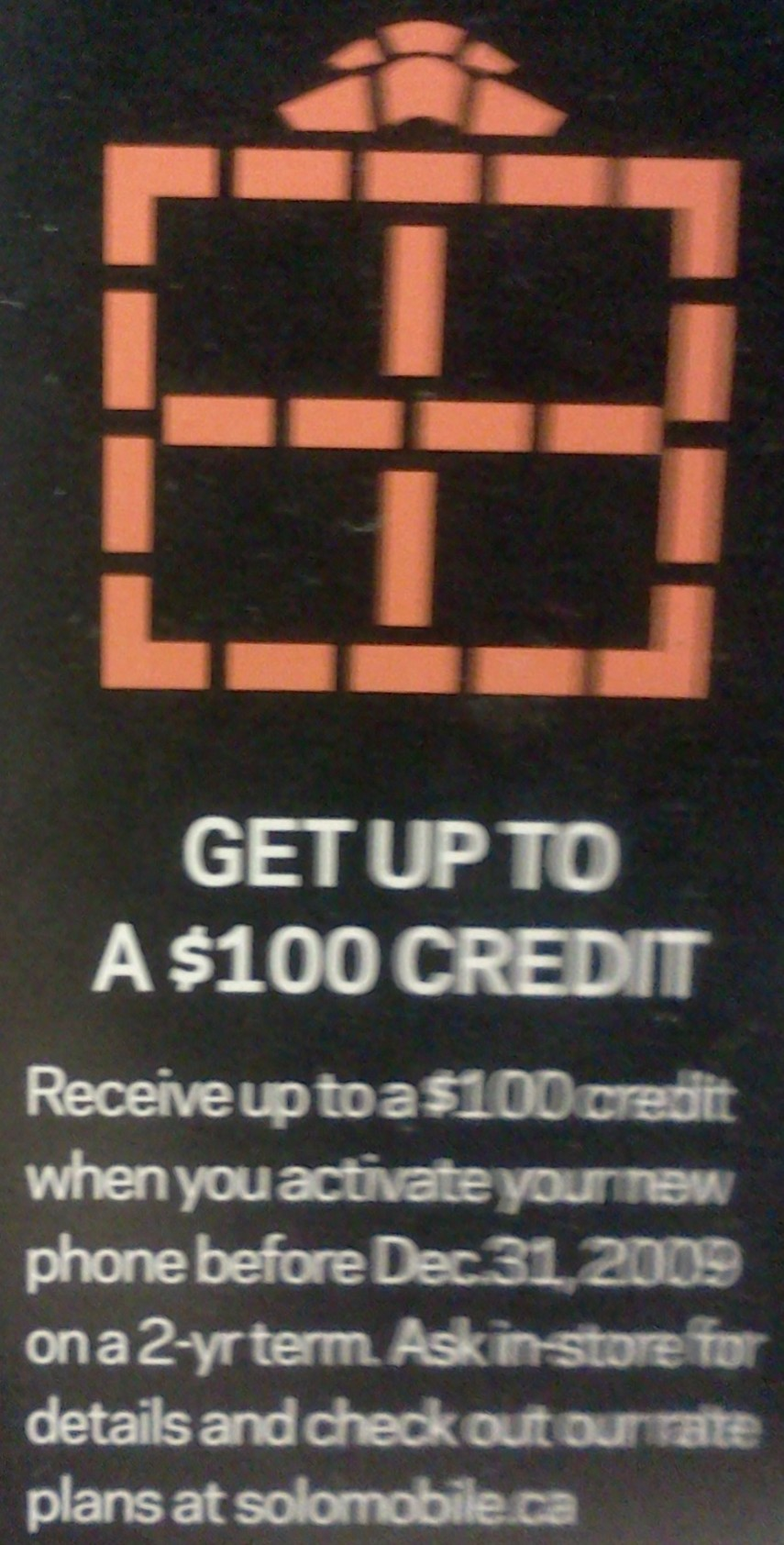 Une offre promotionelle de Solo Mobile offrant jusqu'à 100$ en crédits pour ceux qui s'inscrivent avec un contrat de deux ans.